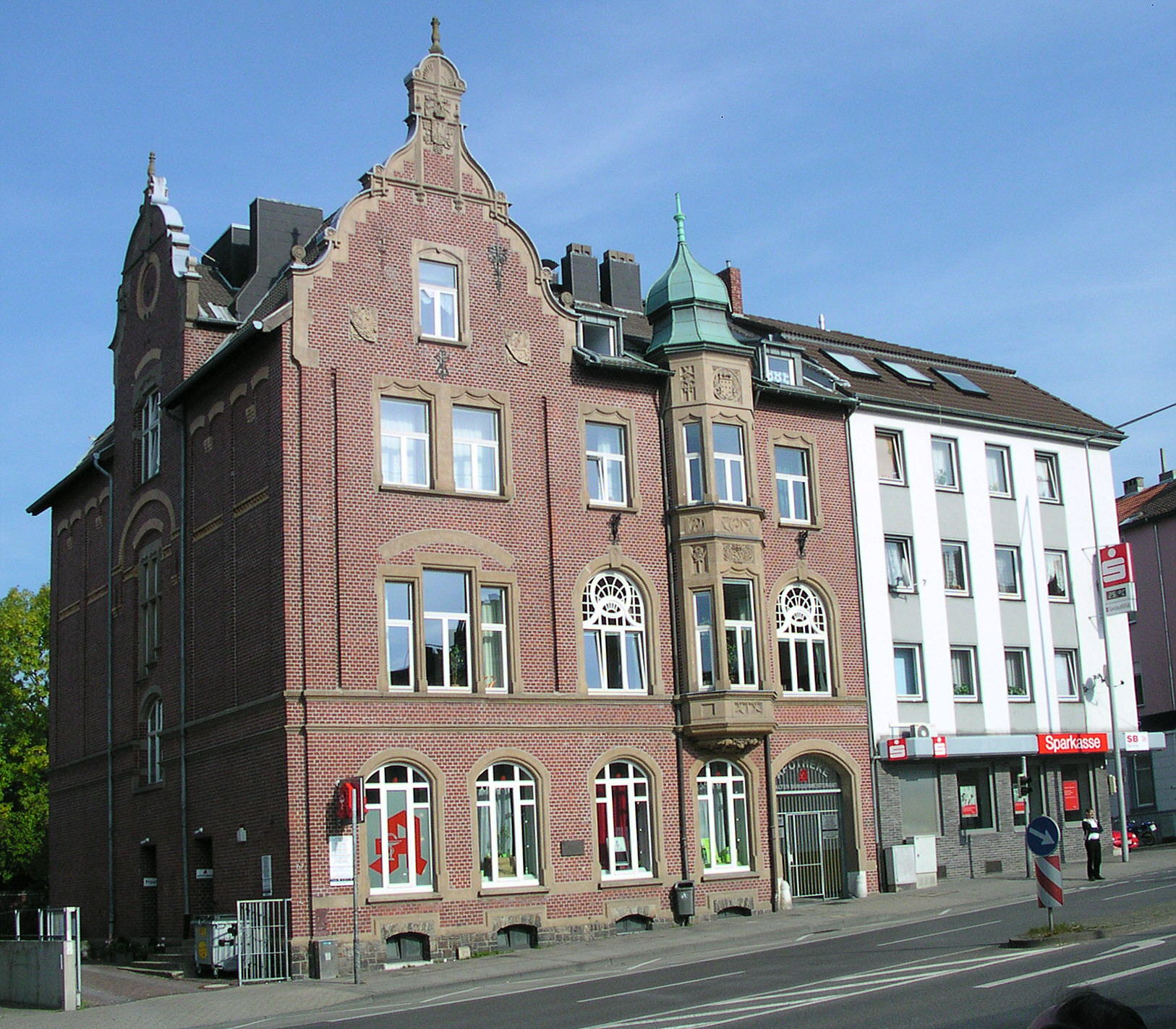 ehemaliges Rathaus von Forst (Aachen-Forst), enthielt auch eine Polizeiwache mit Zellen und Wohnungen für zwei Lehrerinnen. Jugendstilelemente deuten darauf hin, daß es kurz vor Verlust der Unabhängigkeit von Forst (1906) erstellt wurde. Das Sparkassengebäude daneben ist ein Nachkriegsbau (geringe Geschoßhöhen)